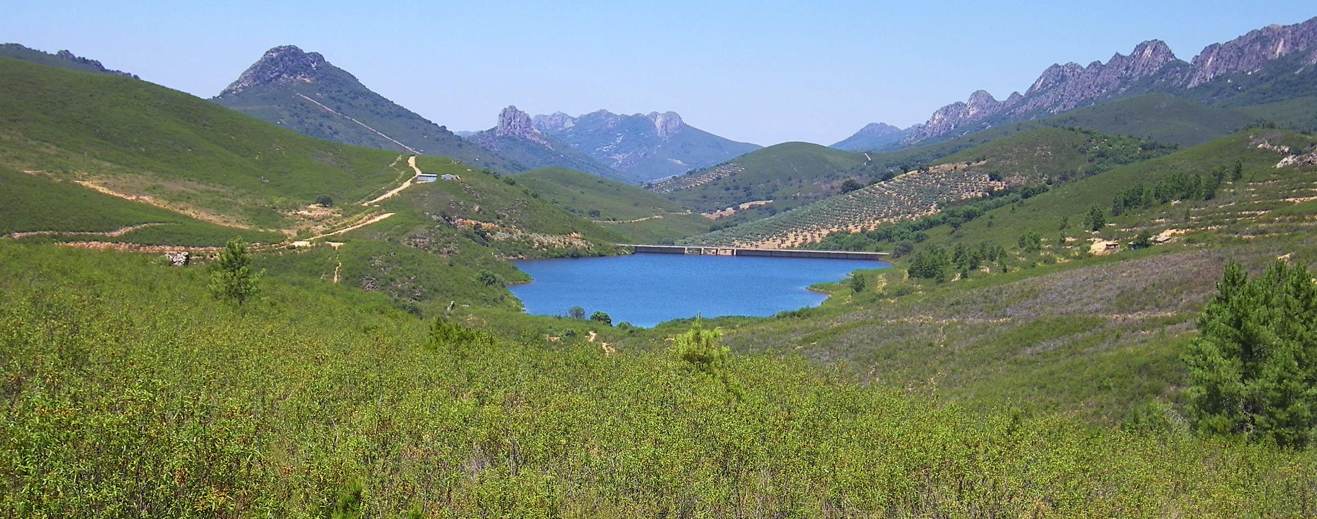 Presa situada en el municipio de Navezuelas (Cáceres)